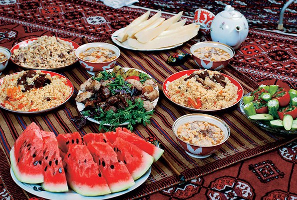 Туркменская